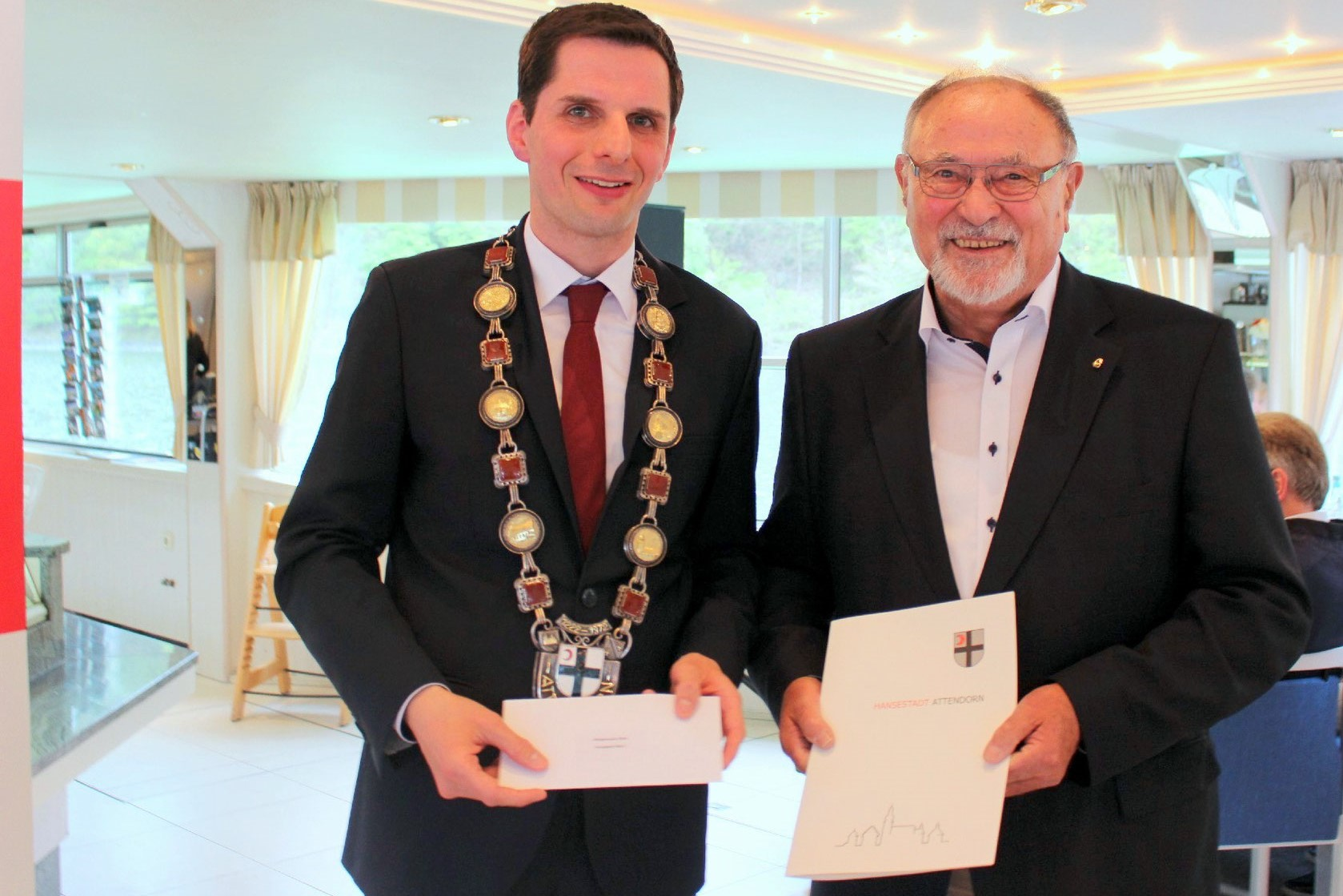 Hartmut Hosenfeld (rechts) mit Bürgermeister Christian Pospischil bei der Verleihung des Bürgerpreises der Stadt Attendorn im Mai 2017